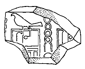 Tonsiegelfragment des Aha